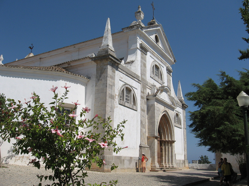 Santa Maria do Castelo Church of Tavira, Portugal